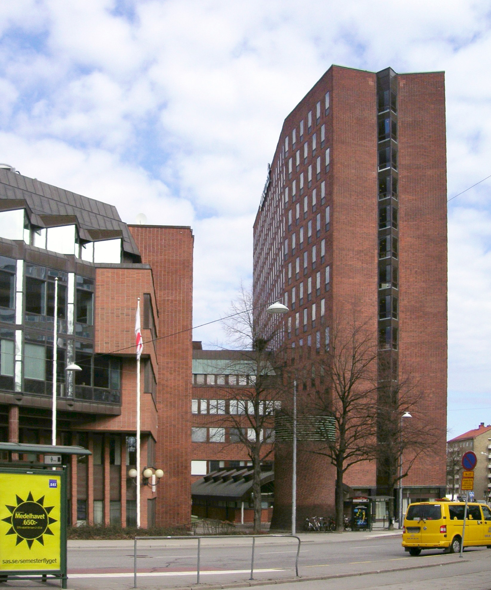 SvD-huset